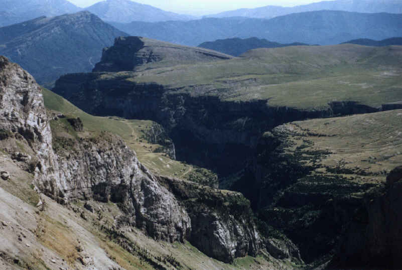 Valle o Cañón de Añisclo visto desde el collado del mismo nombre, en el Parque nacional de Ordesa y Monte Perdido en la provincia de Huesca, (España). Tomada por JMSE el 13 de julio de 2002 y cedida a Wikipedia. Categoría:España (imagen) Categoría:Fotografía (imagen)